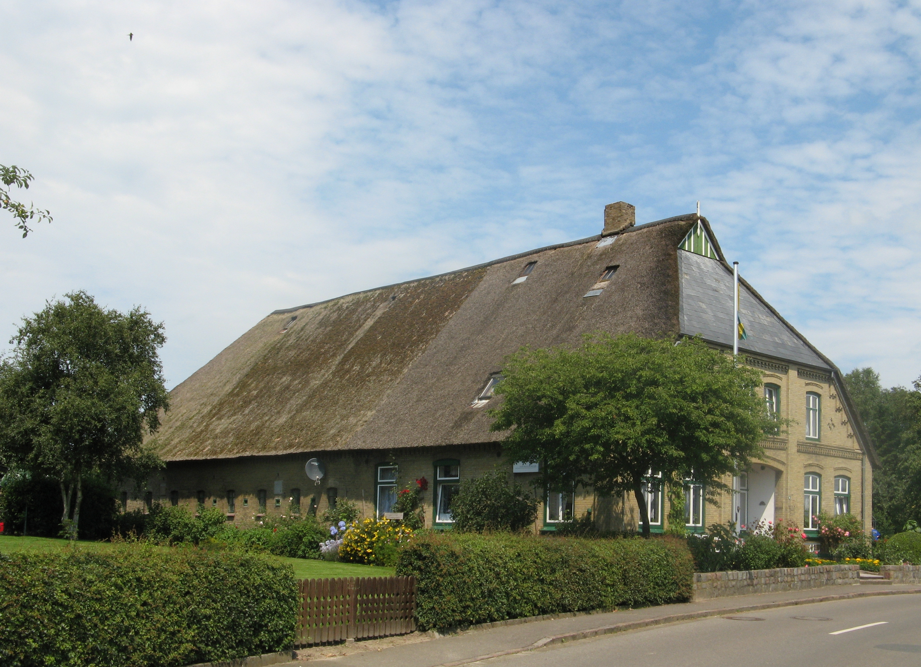 House in Delve